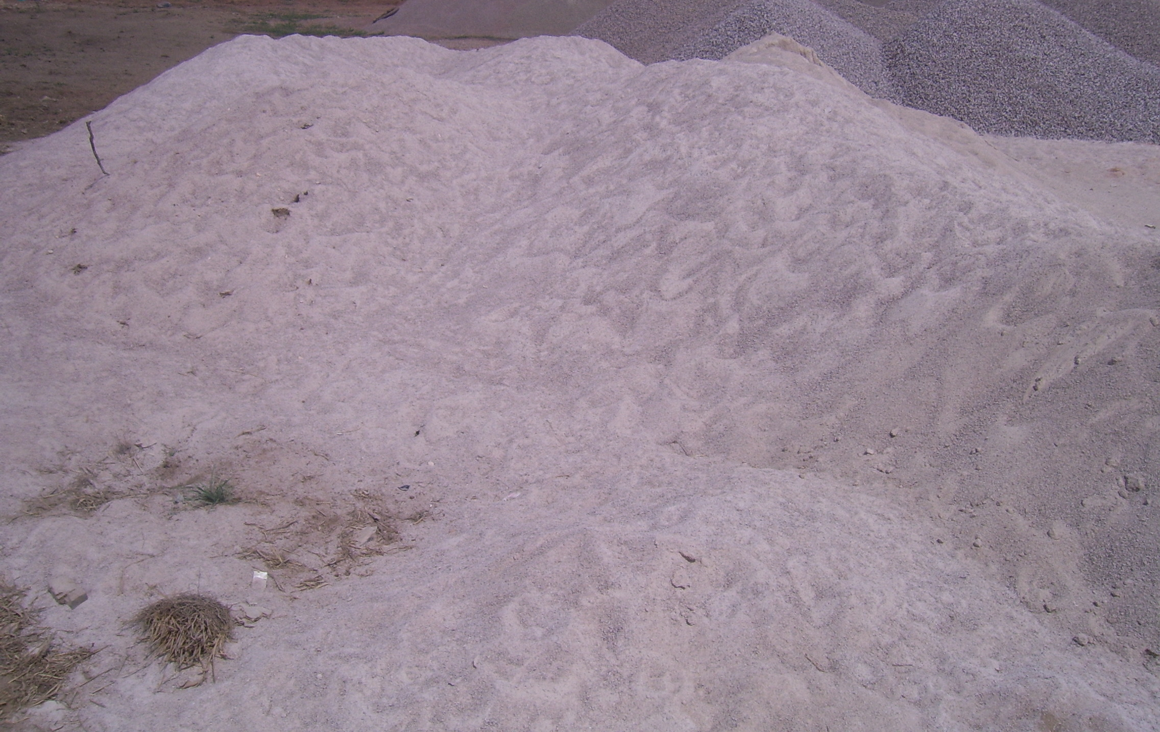 Pó de brita utilizado na pavimentação asfaltica.